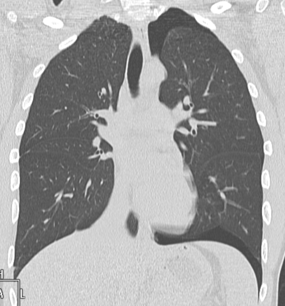 Česky: Spontánní pneumothorax na CT